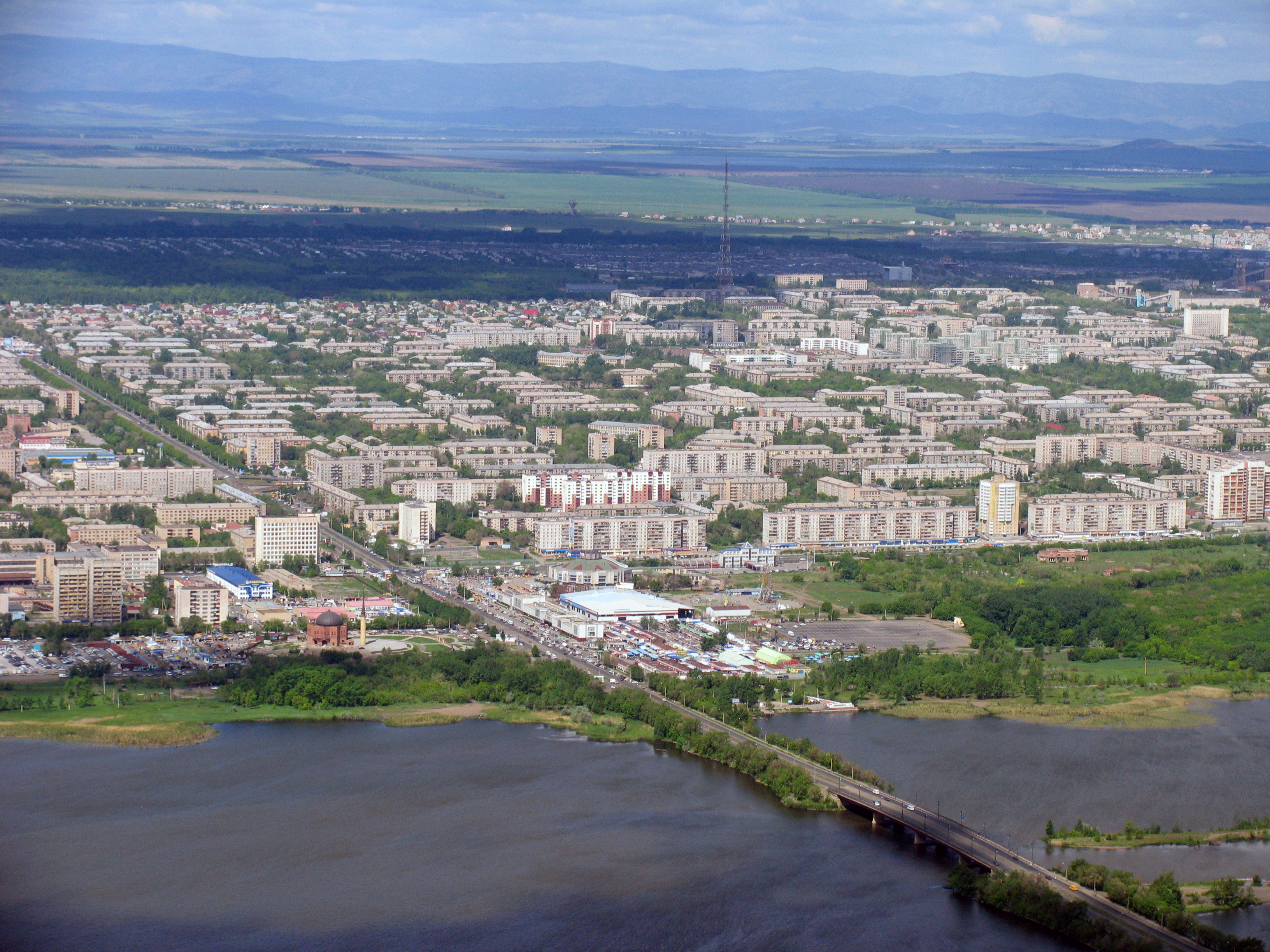 Правобережный район